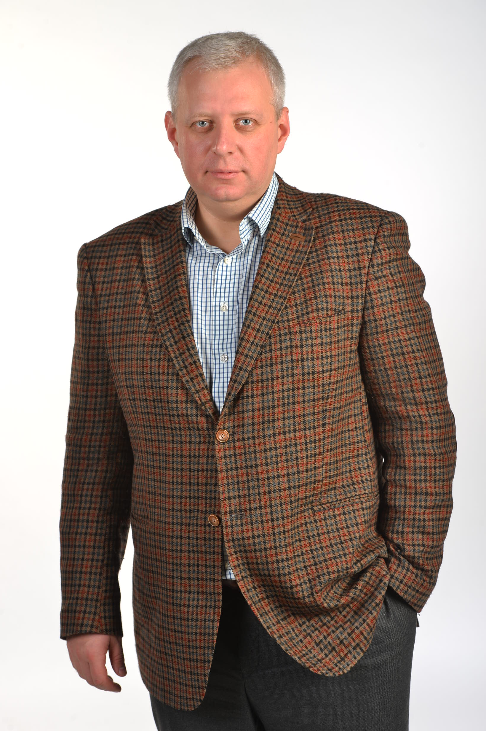 Urmo Soonvald